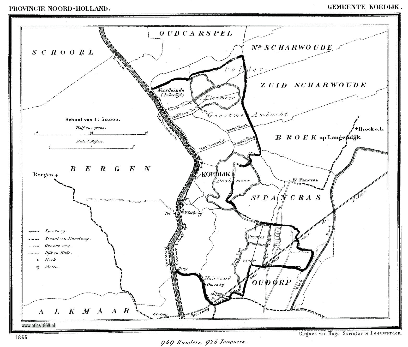 Kaart van Koedijk uit Gemeente Atlas van Nederland, J. Kuyper 1865-1870, Uitgave Hugo Suringar Leeuwarden.